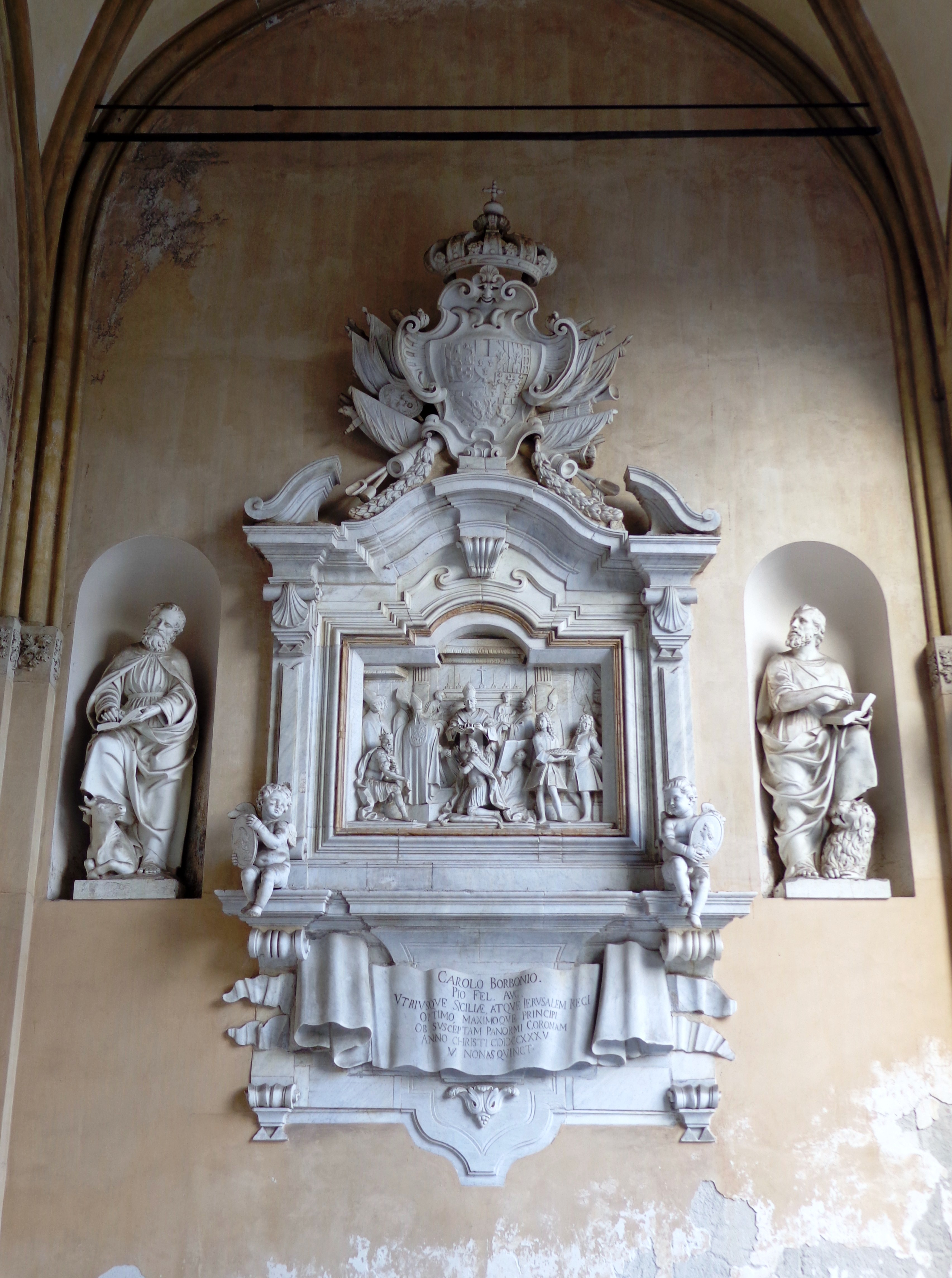 Cattedrale_PA_01